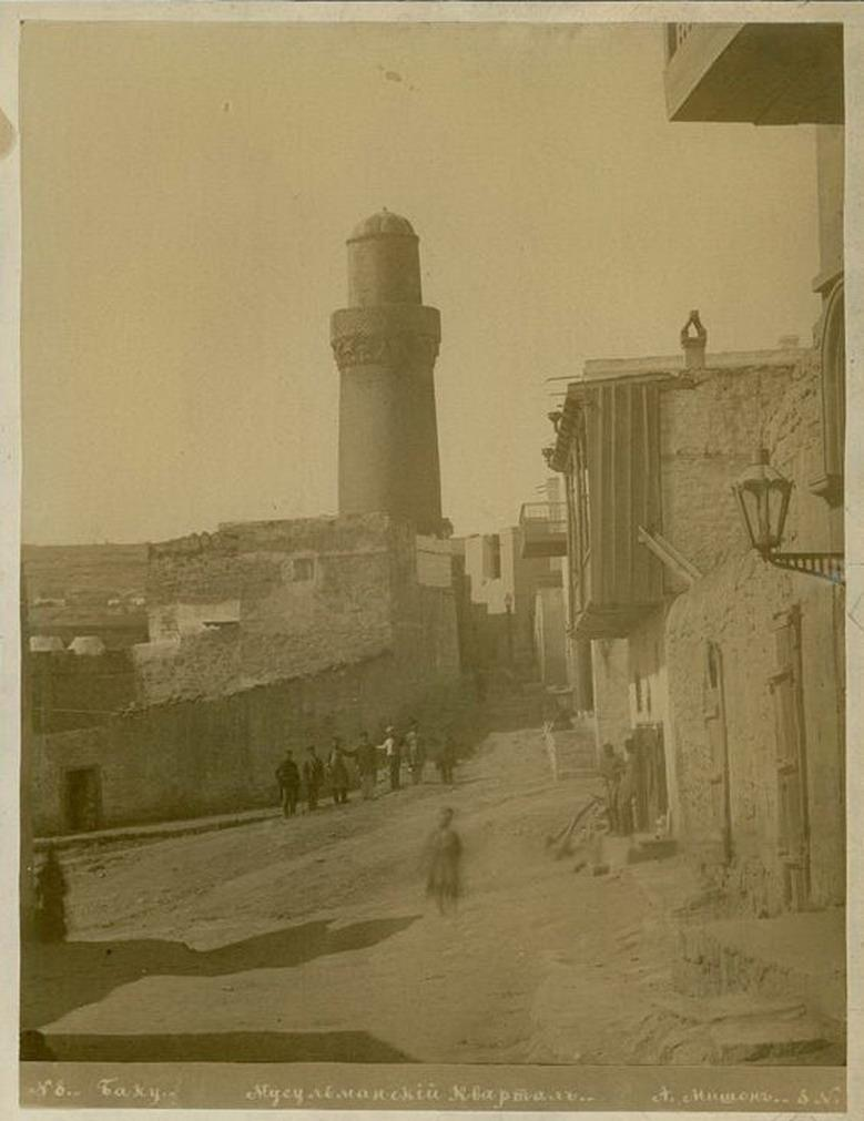 Снимок сделанный Александром Мишоном в Баку. (1898 год)